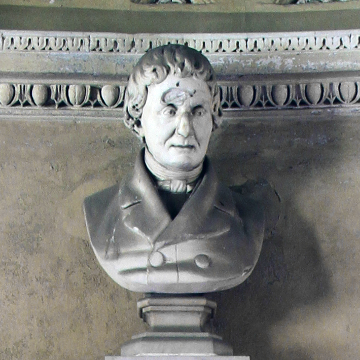 Busto raffigurante l'architetto Giuseppe Marchesi, parte del monumento a lui dedicato all'interno dello Scalone dell'Università di Pavia